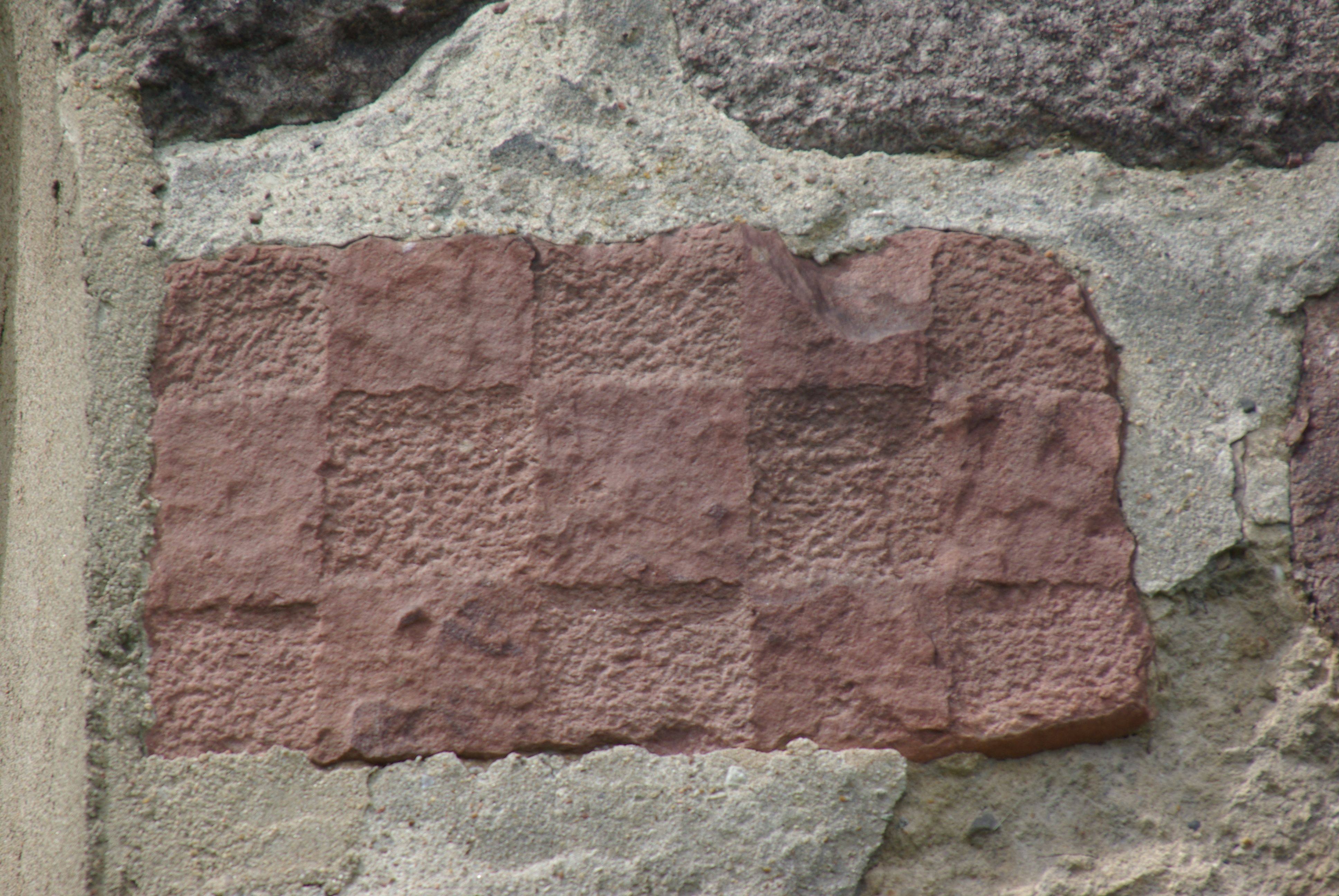 Rietz-Neuendorf Ortsteil Herzberg. Der Schachbrettstein befindet sich an der Osteite der Kirche. Direkt daneben befindet sich ein weiterer Stein, allerdings etwas kleiner.